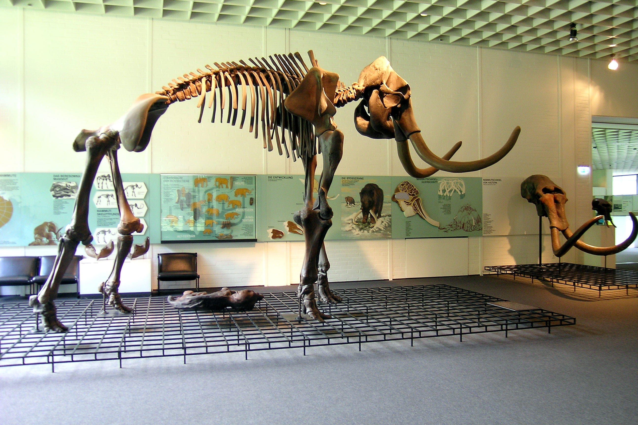 Museum Quadrat Bottrop, Eiszeithalle mit Mammut-Skelet